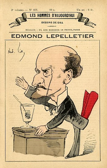 Caricature d'Edmond Lepelletier dans Les Hommes d'aujourd'hui, vol. 3, n° 107, 1881.